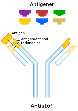 Illustration af antigener og et antistof.